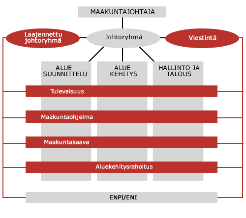 Kuvaus maakunnan liiton organisaatiosta 1.1.2014.